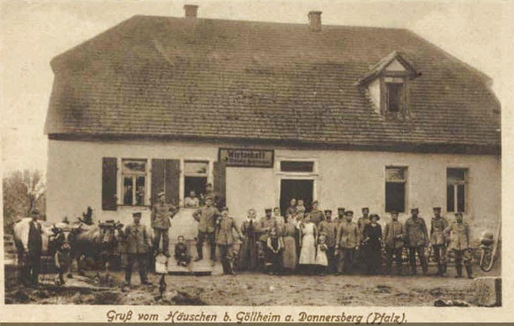 Waldgasthaus "Gölheimer Häuschen" bei Ramsen in Rheinland-Pfalz, Deutschland, 1910. Amtlich/postalisch zu Kerzenheim gehörend